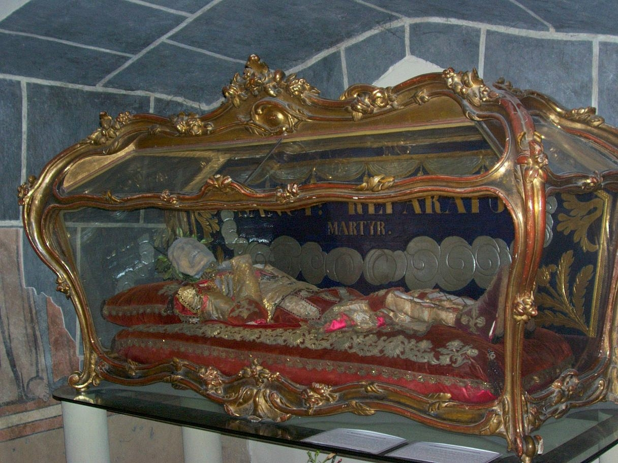 Sv. Reparatus, diakon a mučeník. Relikvia svätca žijúceho v 4. storočí